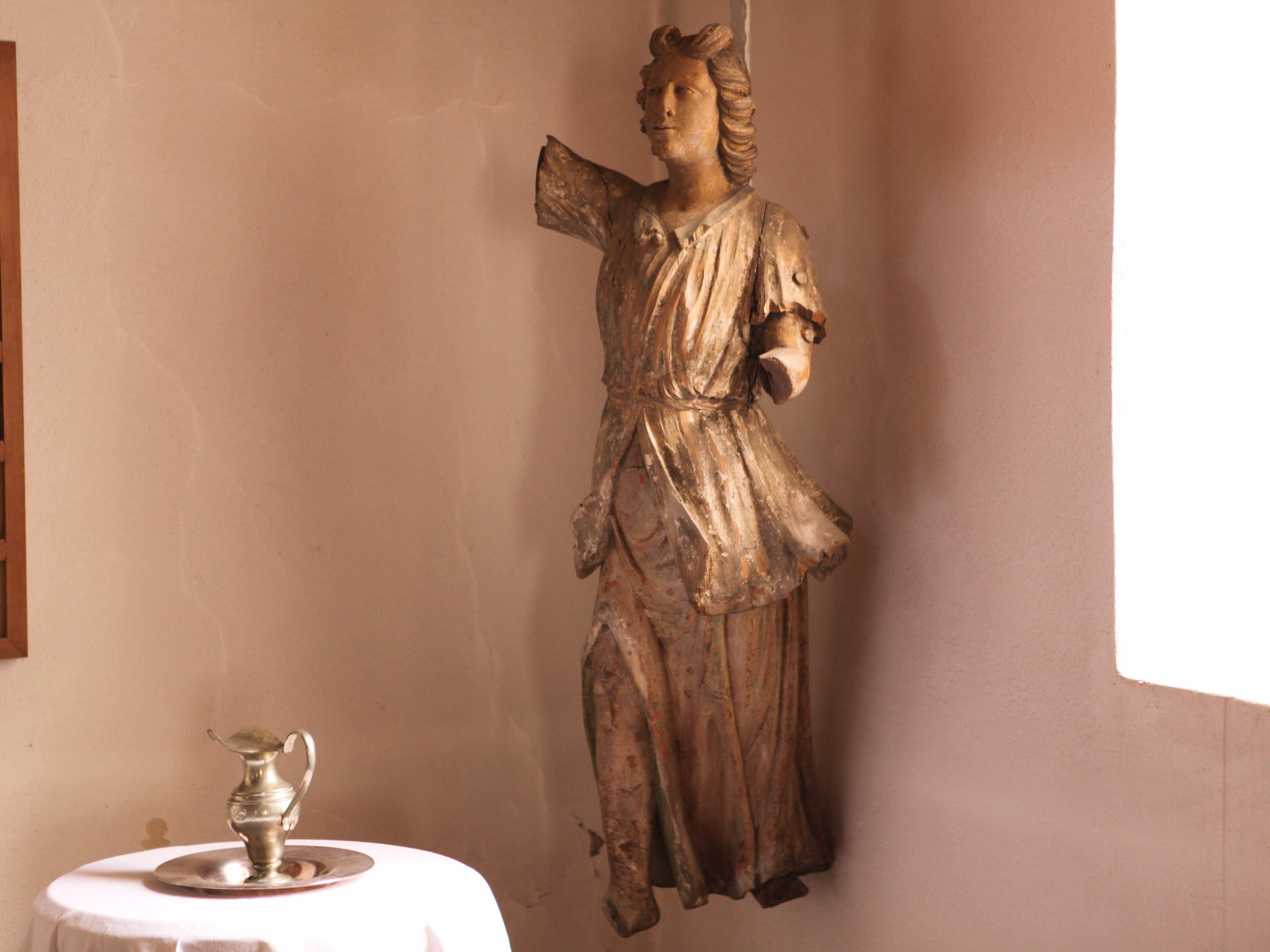 St. Jacobus, Herreth im Itzgrund